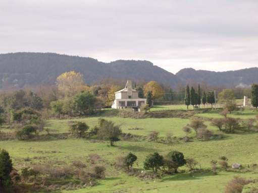 Autore: Gino Larosa OTRS: 2008021510007787